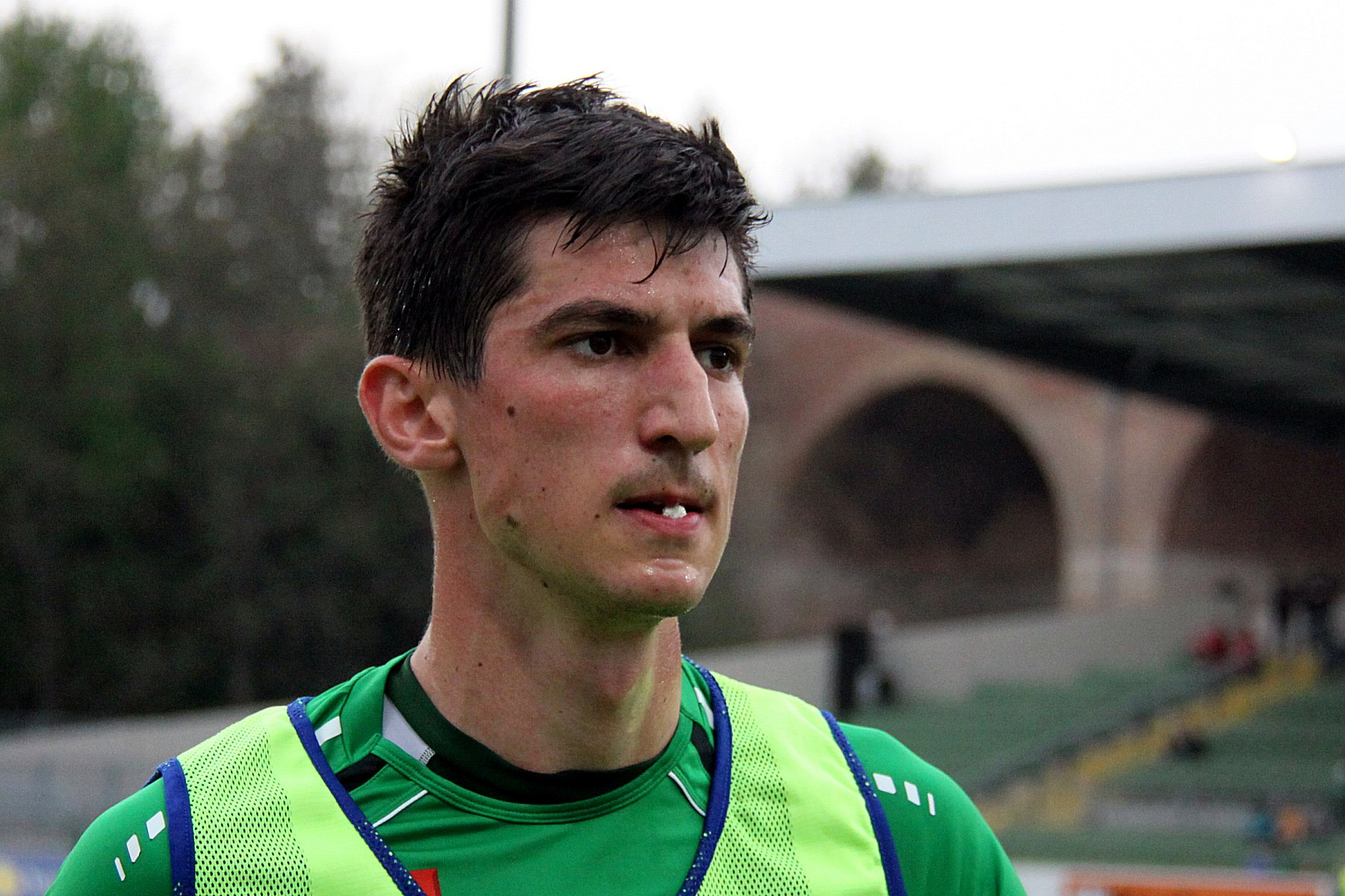 Meisterschaftsspiel der österreichischen Bundesliga: SV Mattersburg gegen FC Wacker Innsbruck am 7. April 2013 (0:0)] im Mattersburger Pappelstadion.] - Das Foto zeigt Marco Kofler (FC Wacker Innsbruck). Object location47° 44′ 21.66″ N, 16° 24′ 23.13″ E